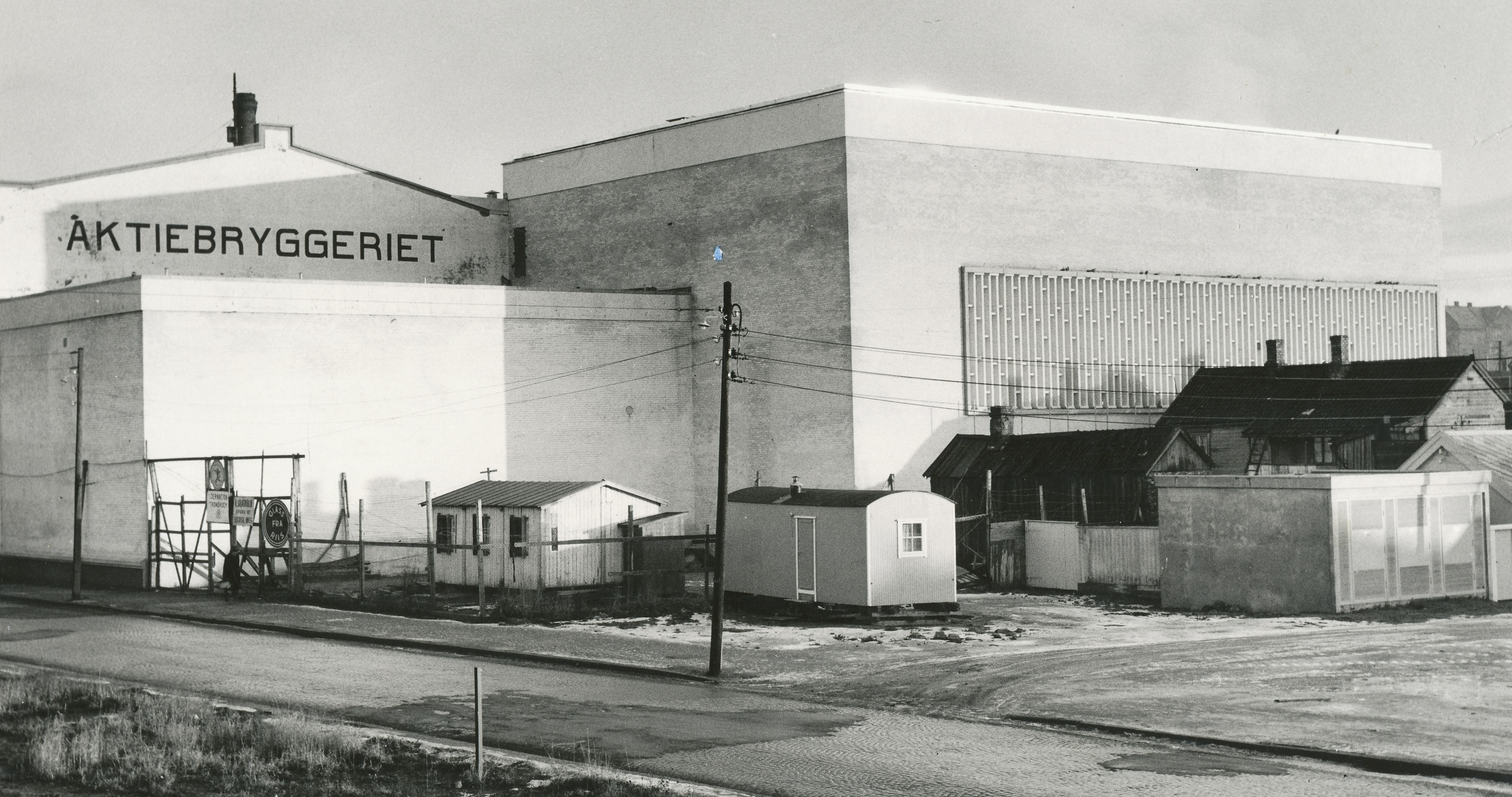 Aktiebryggeriet, senere E.C. Dahls bryggeri, i Trondheim i november 1964.